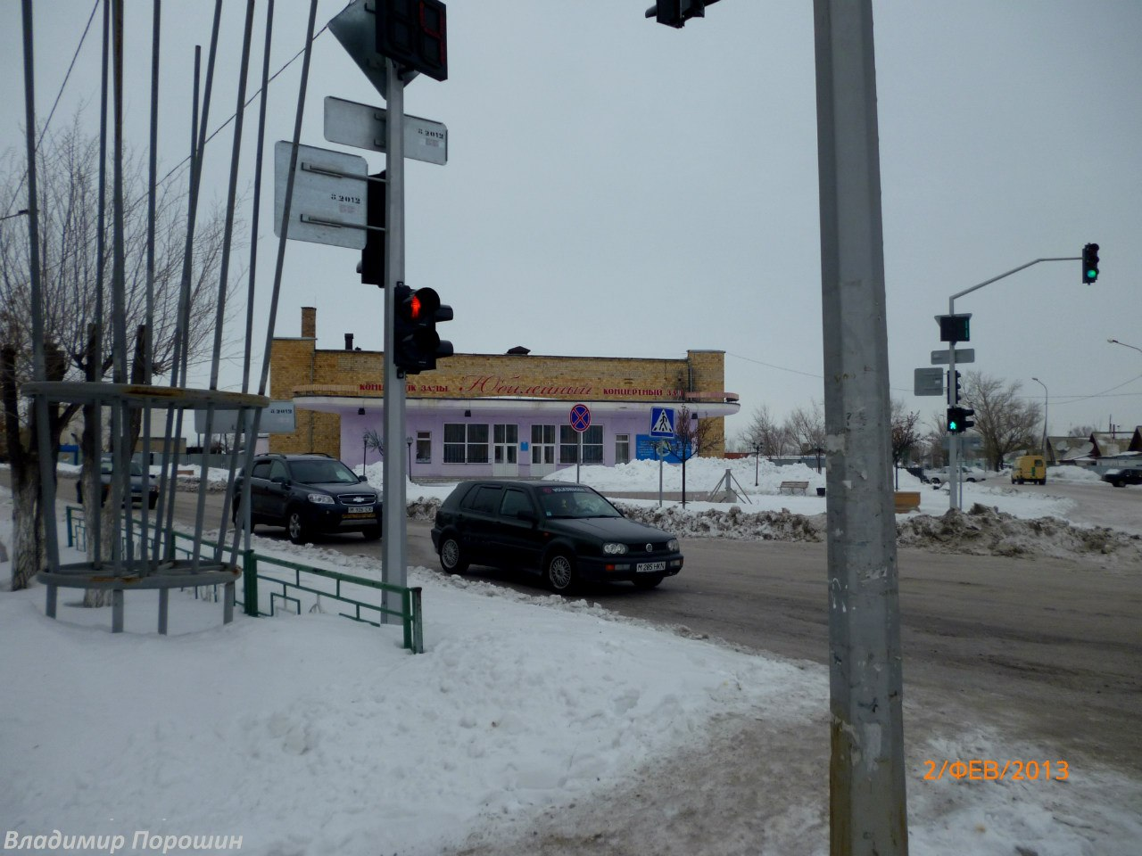 Прогулка с фотоаппаратом по родному городу